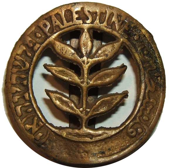 סיכה ששימשה אנשים בבריגדה היהודית, שנות ה-40